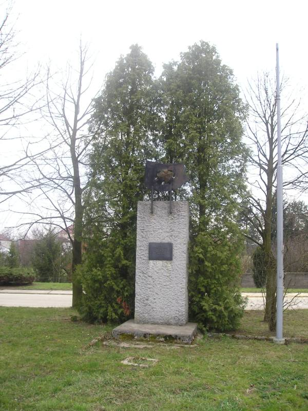 Pomník vojenskému oddílu Železo, Nučice (autor Arnošt Paderlík, 1975